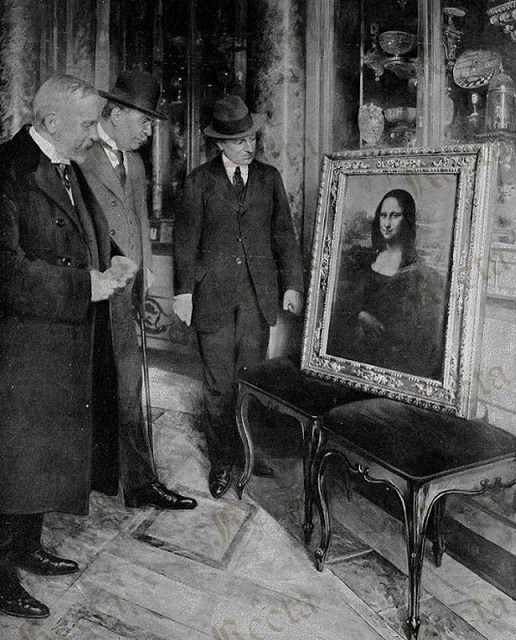 Luigi Cavenaghi, Corrado Ricci e Giovanni Poggi con la Gioconda di Leonardo negli Uffizi di Firenze.